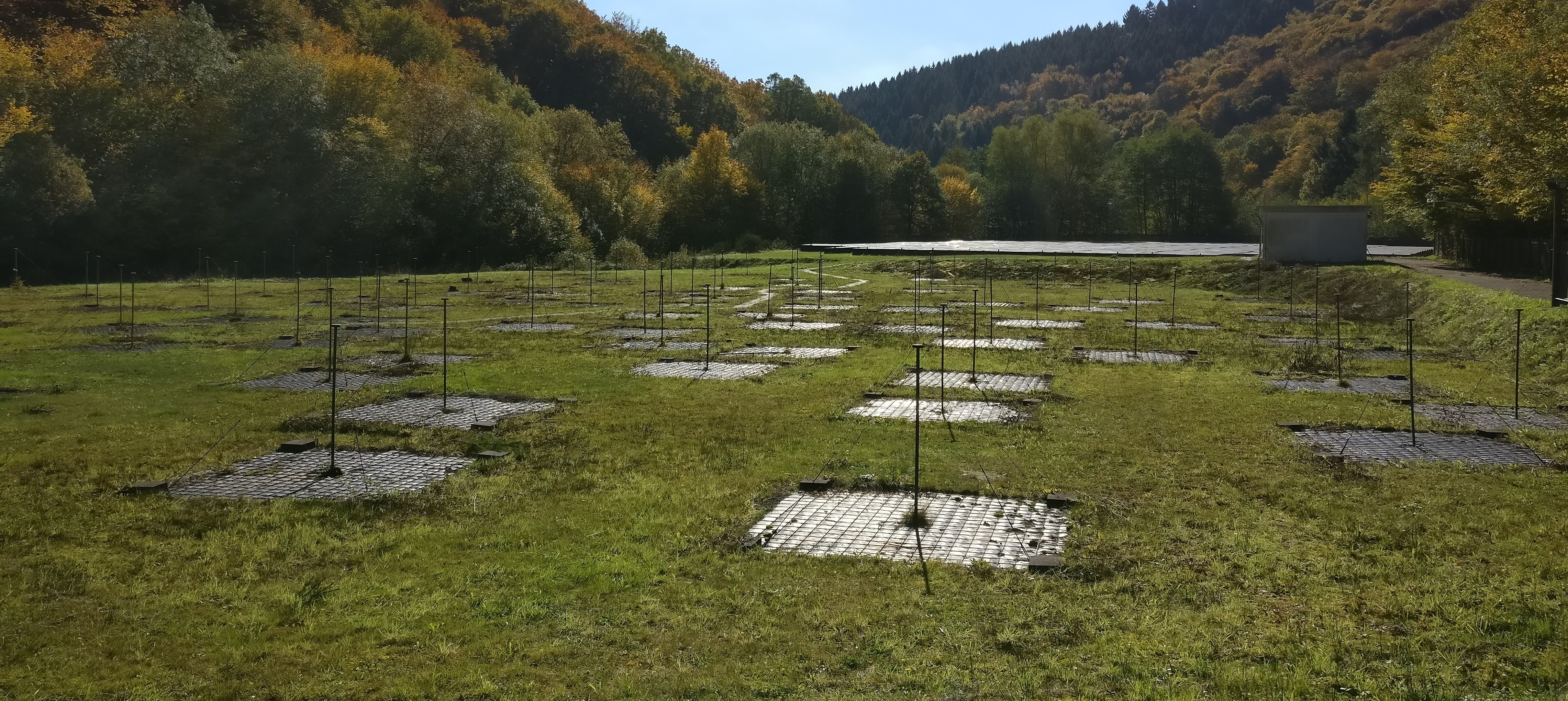 Das Bild zeigt die im Jahr 2007 installierte, niederfrequente LOFAR-Station am Radioteleskop Effelsberg. Das Feld besteht aus 96 Einzelantennen und war die zweite LOFAR-Station überhaupt.[1]